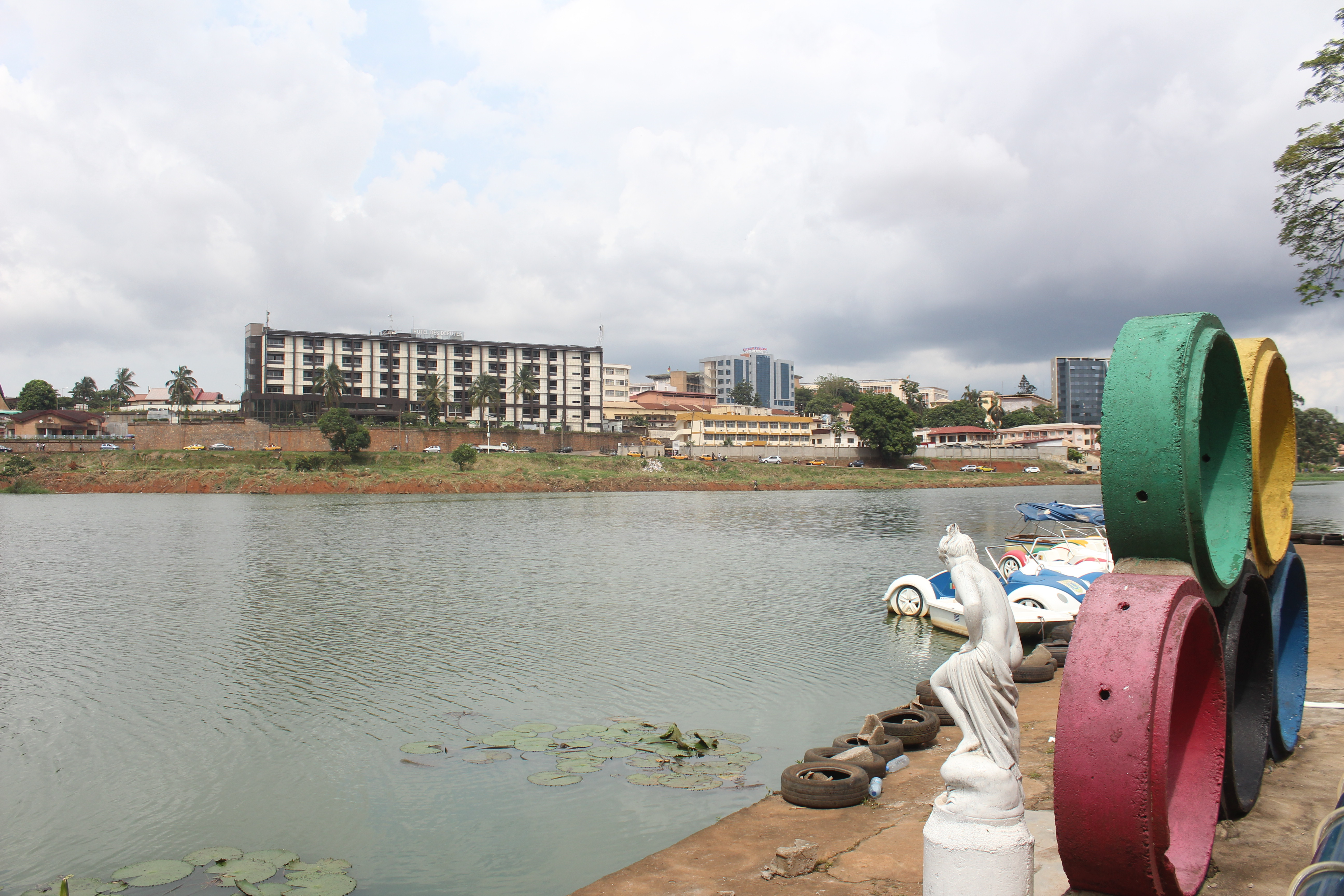 Lac municipal de Yaounde